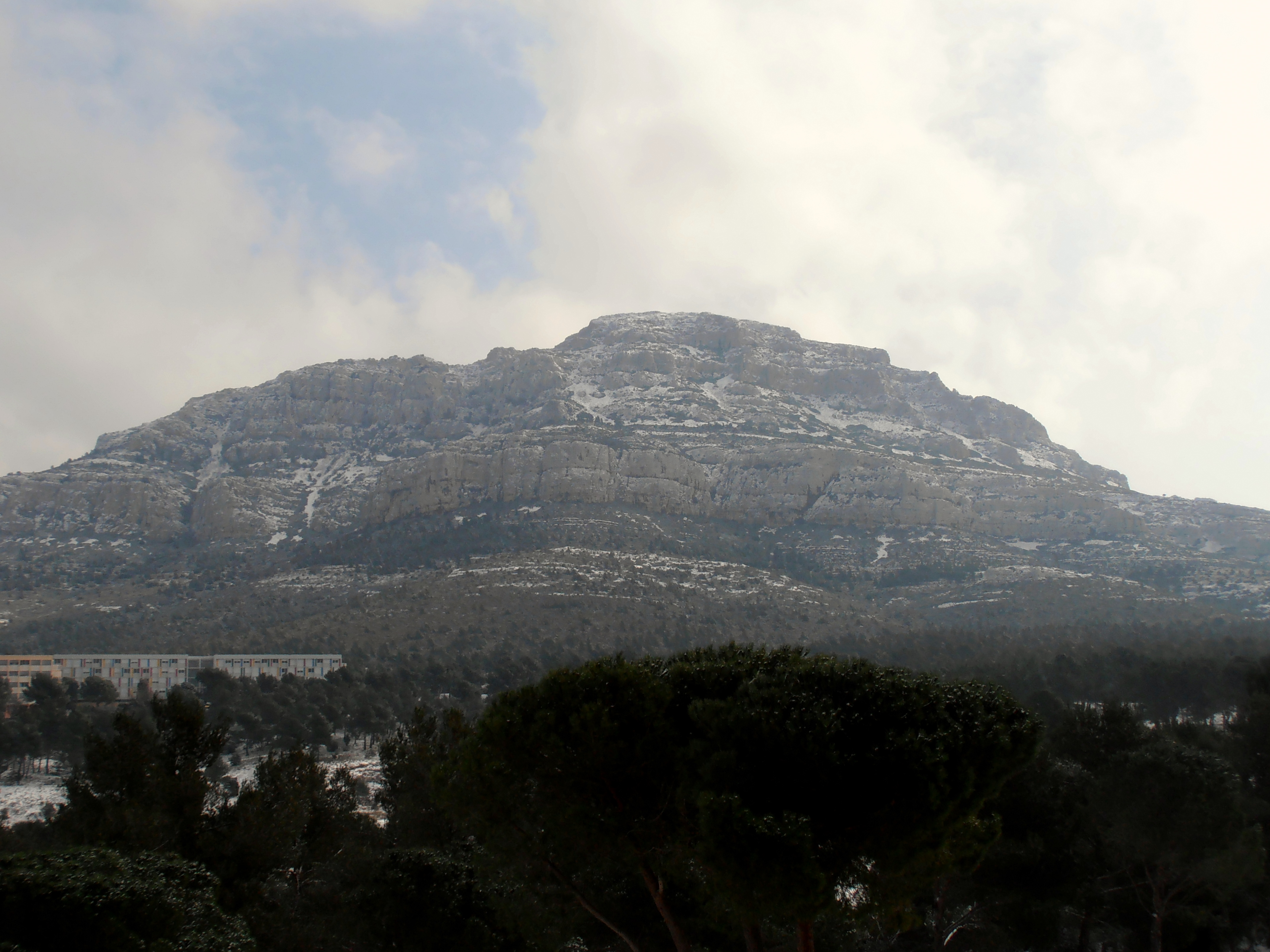 Mont Puget enneigé, 05 février 2012, vu depuis cité universitaire (Luminy)